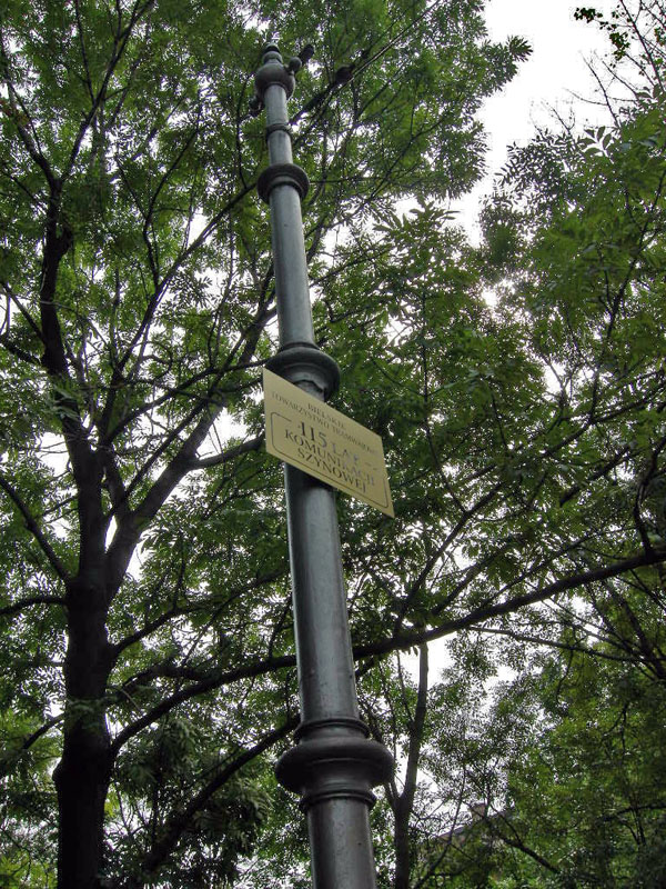 Pamiątkowy słup zlikwidowanej bielskiej trakcji tramwajowej u zbiegu ulicy 3 Maja i Zamenhofa.